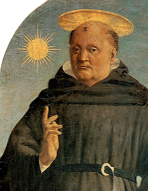 Saint Nicolas of Tolentino Piero della Francesca Oil and tempera on panel, 139,4 x 59,2 cm Milan, Museo Poldi Pezzoli